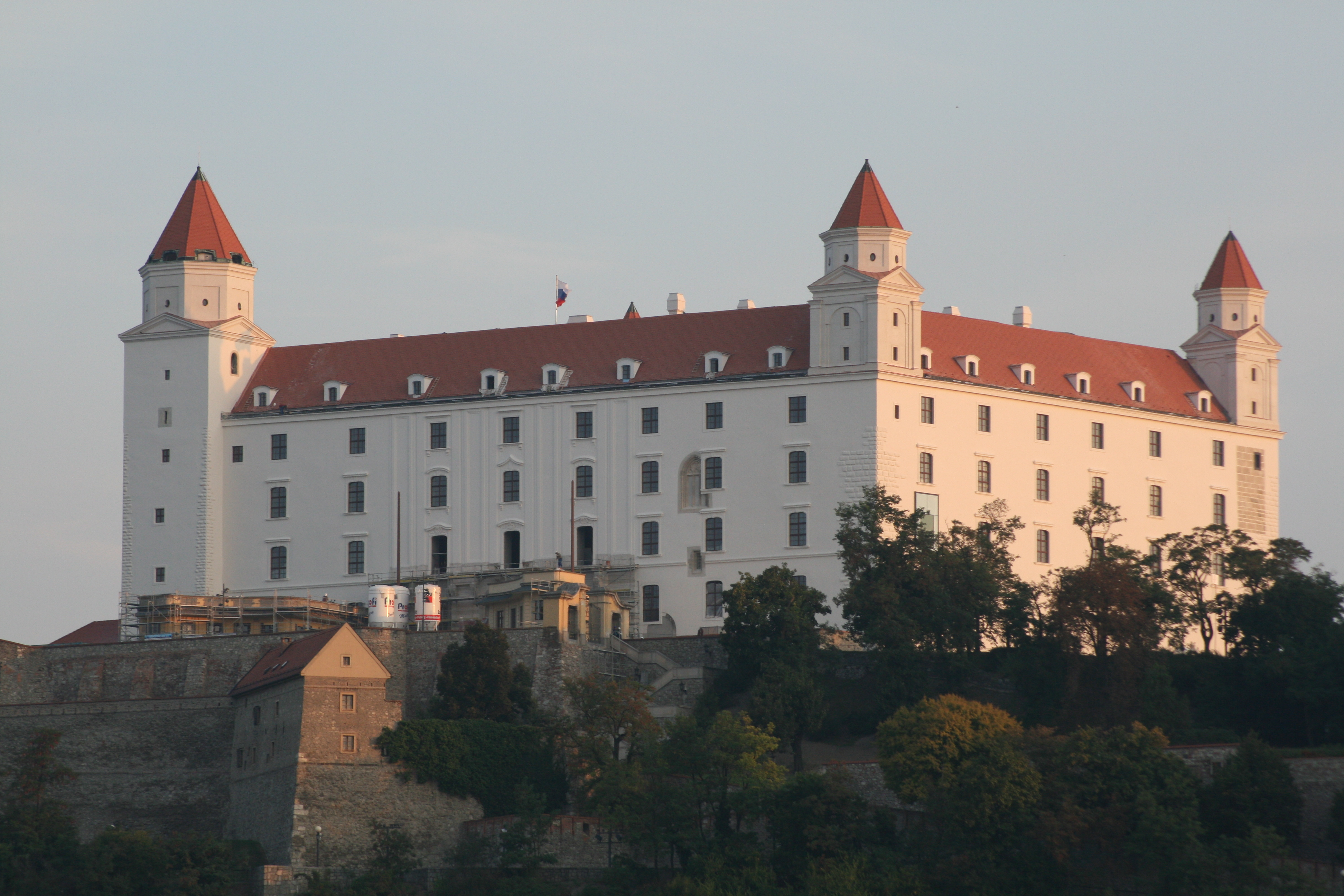 Bratislavský hrad po rekonštrukcii